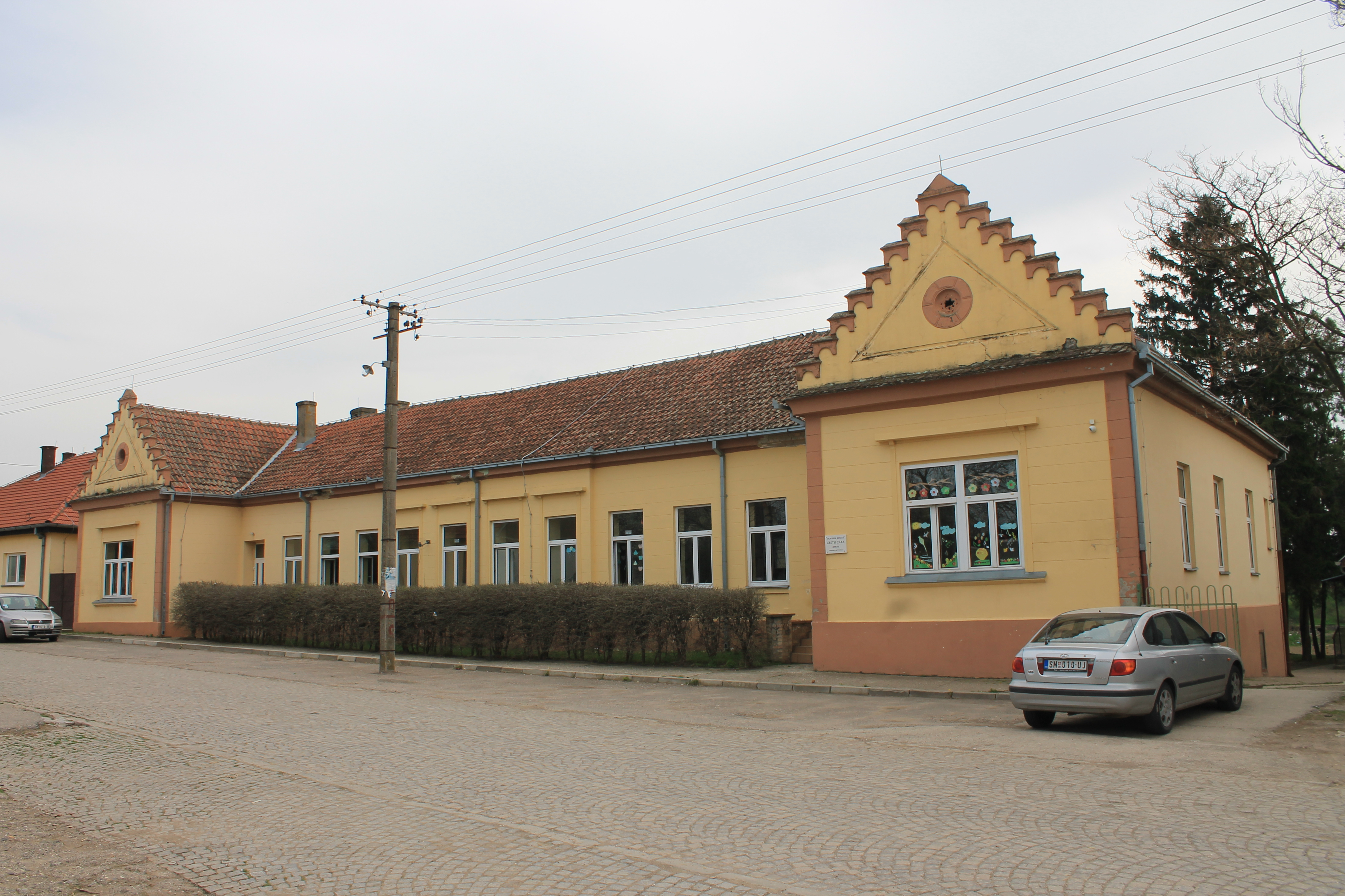 Divoš